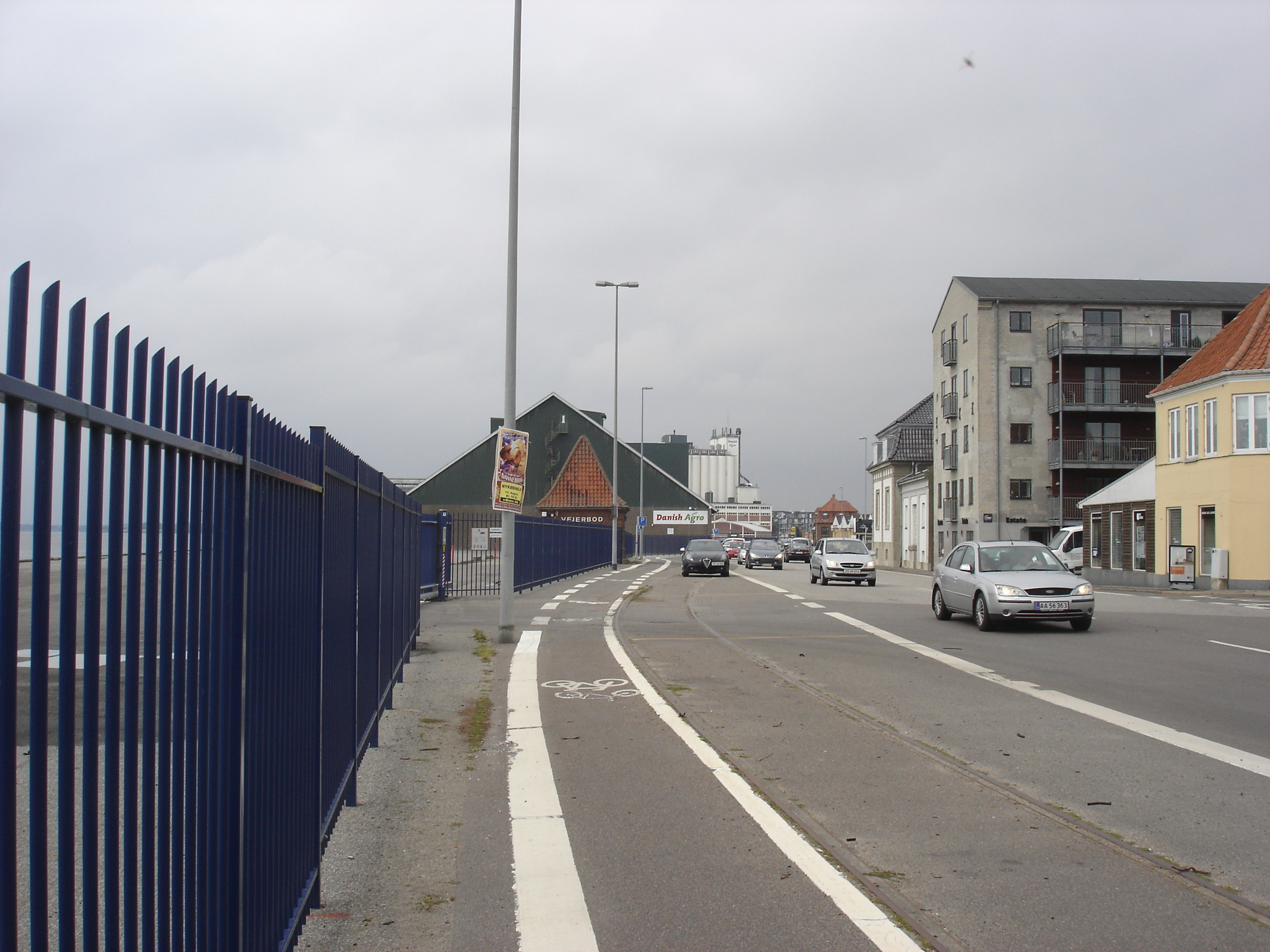 Nykøbing Falster Havnebane V for Havnepladsen